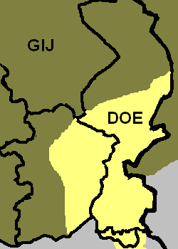 Eigen kaart